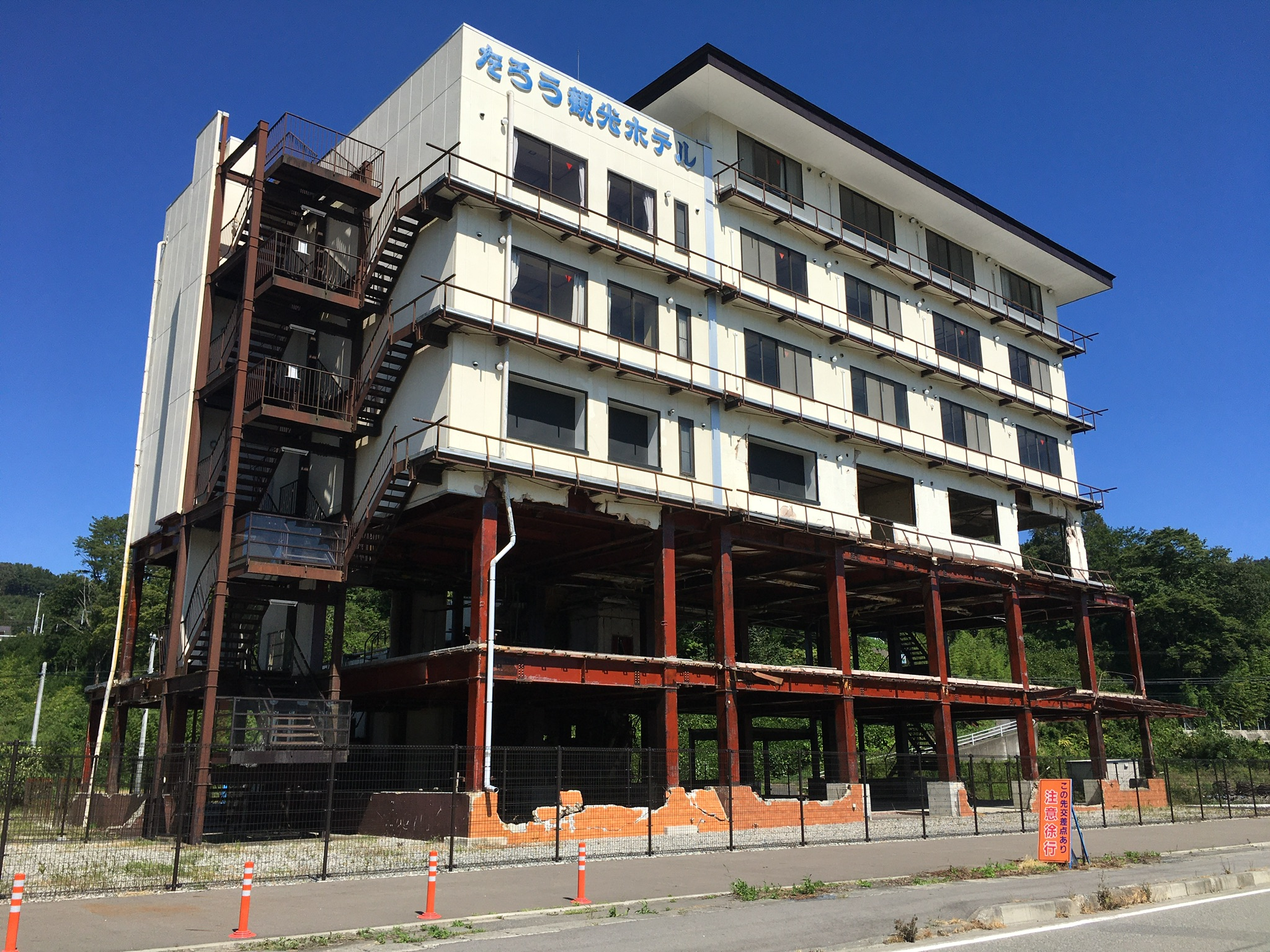 晴天下のもと撮影